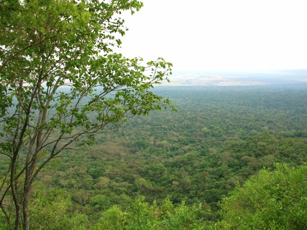 Vista do PE do Morro do Diabo.